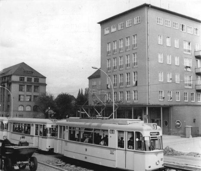 Chemnitz, Neubauviertel Altchemnitz, Straßenbahn Zentralbild Gahlbeck 18.9.1961 Weiterer Teilabschnitt der Karl-Marx-Städter Straßenbahnumspurung fertiggestellt. Ein weiterer Teilabschnitt der Straßenbahnumspurung in Karl-Marx-Stadt konnte am 14.9.1961 dem Verkehr übergeben werden. Oberbürgermeister Fritz Schneller dankte in einer Ansprache den Bauarbeitern und den zahlreichen freiwilligen Helfern aus der Bevölkerung für ihre großen Anstrengungen, durch die es ihnen gelang, eine wichtige Teilstrecke zu Ehren der Wahlen am 17. September fertigzustellen. Die an der Ausführung dieses Millionenobjektes beteiligten Werktätigen waren auch die ertsen Fahrgäste, die nach der feierlichen Inbetriebnahme die modernen Straßenbahnzüge bestiegen. Die neuangelegte 4,3 Kilometer lange Strecke der Linie 5 verbindet den Stadtteil Altchemnitz, in dem sich zahlreiche große Industriebetriebe befinden, mit dem Sadtzentrum. UBz: Die Straßenbahn auf der neuen Strecke. Im Hintergrund Neubauviertel Altchemnitz.